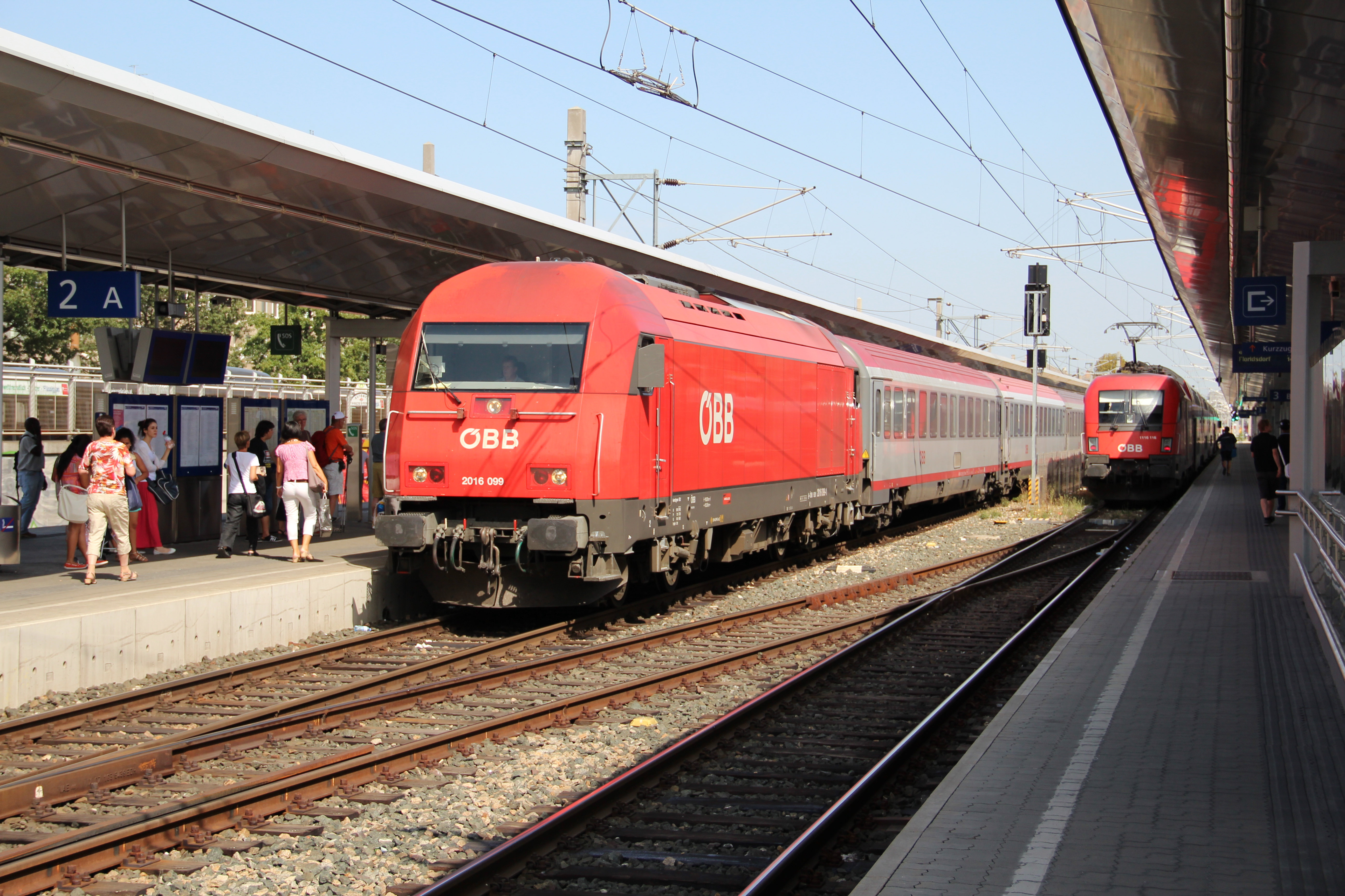 Der REX 2789 nach Friedberg steht in Wien Meidling auf Bahnsteig 2 zur Abfahrt bereit.